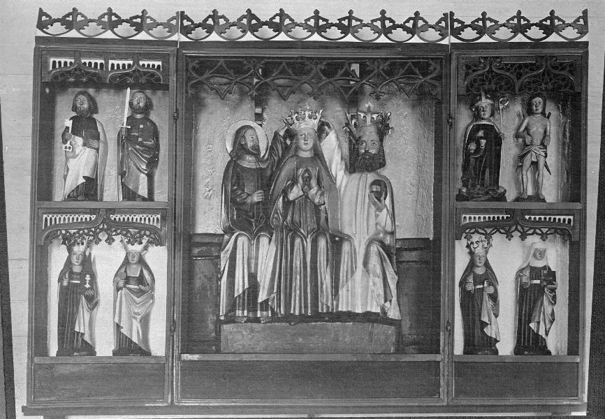 Altarskåp, i corpus Marie kröning, 1500-talet. Kategori: (05) AltarprydnaderAltarskåp, i corpus Marie kröning, 1500-talet.